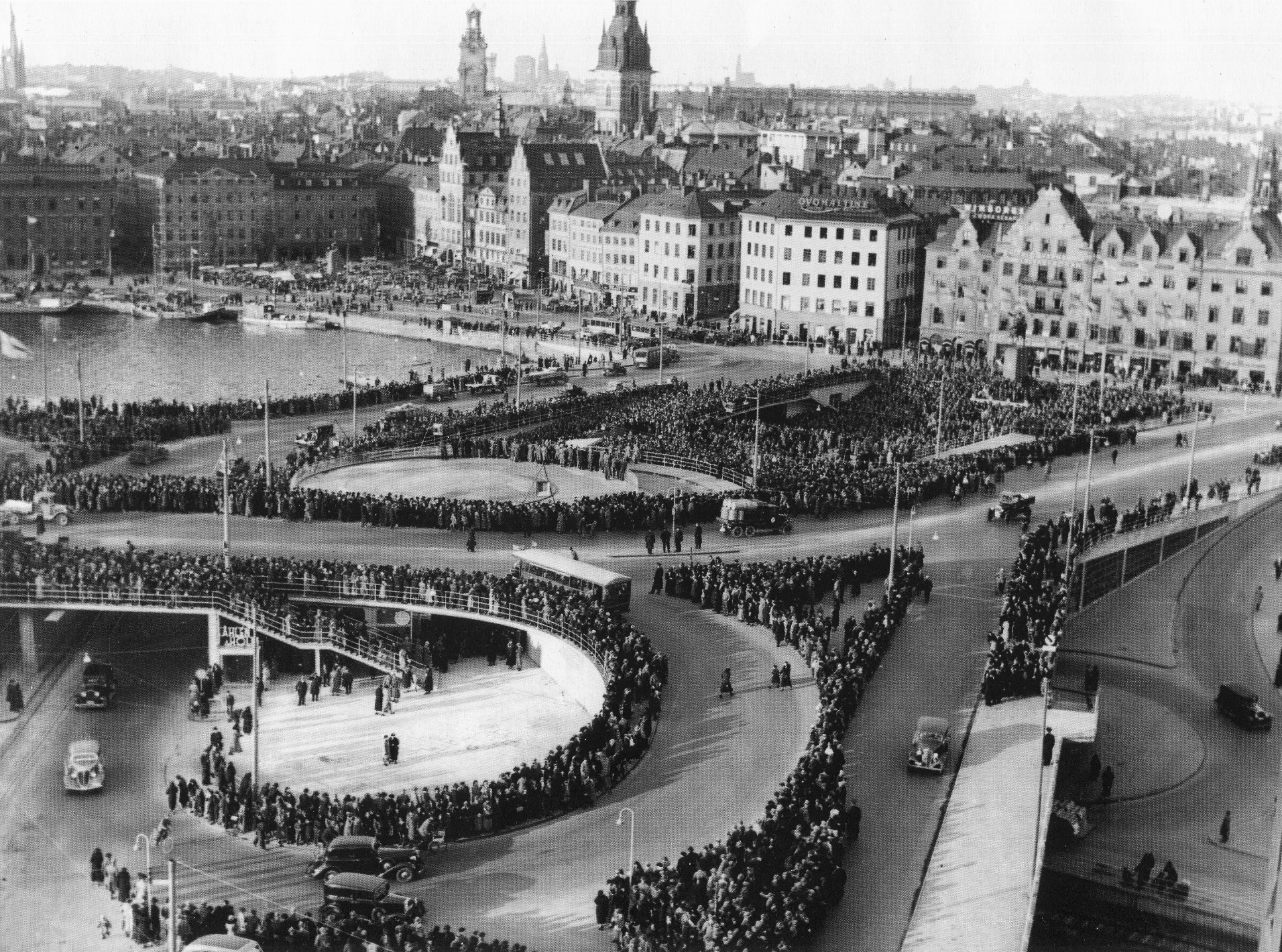 Slussen, Stockholm, invigningen 15 oktober 1935